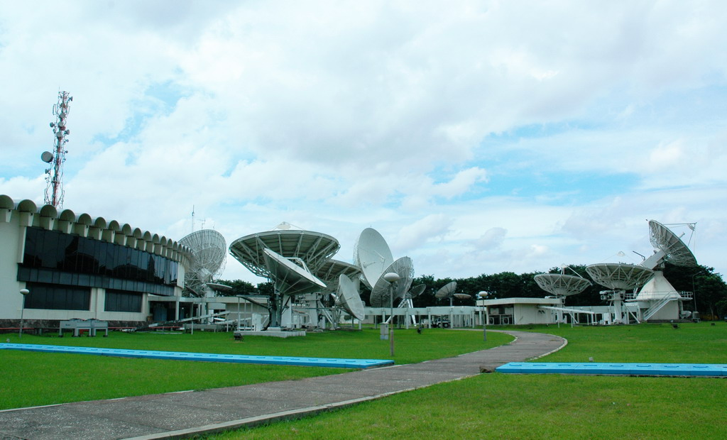 Stasiun bumi Jatiluhur memiliki antena parabola sangat banyak.